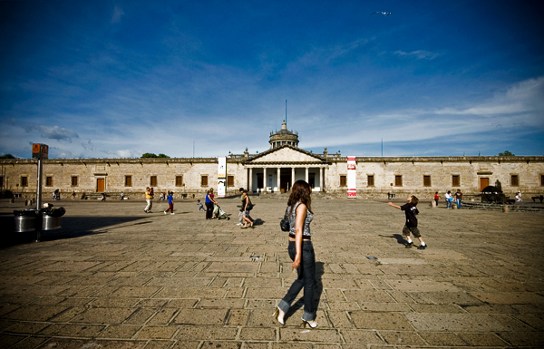 Hospicio Cabañas, Patrimonio de la Humanidad, localizado en la ciudad de México, Guadalajara, JAL.